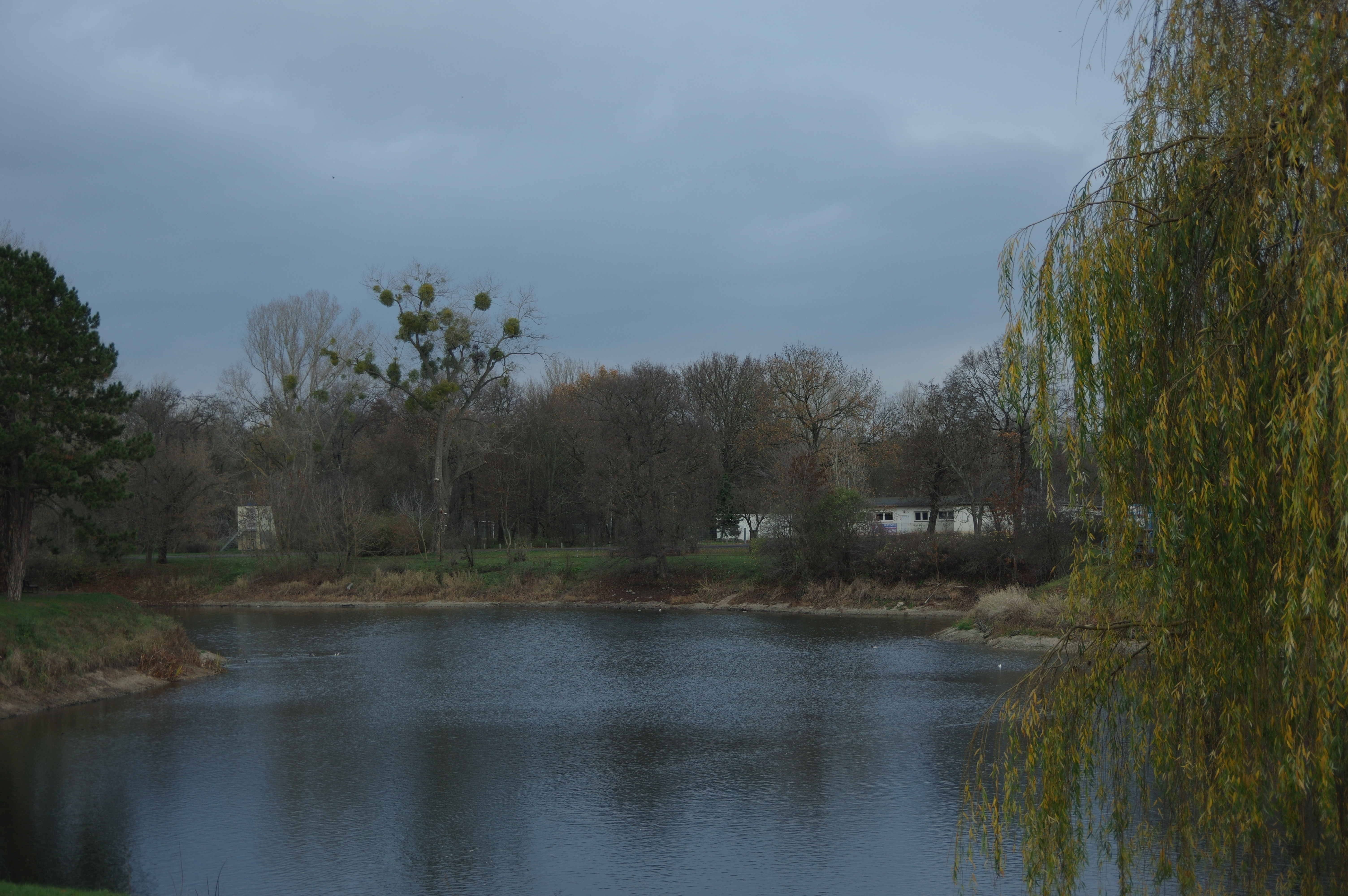 Magdeburg in Sachsen-Anhalt. Der Stadtpark ist denkmalgeschützt.